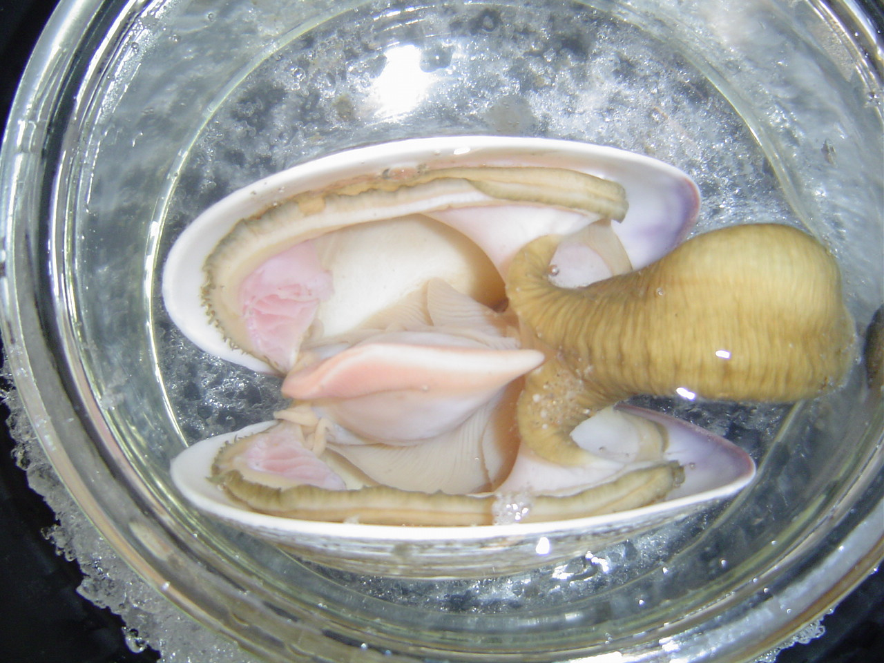 A clam, from Bio 1A lab